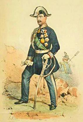 generale sardo Menabrea, circa 1860.